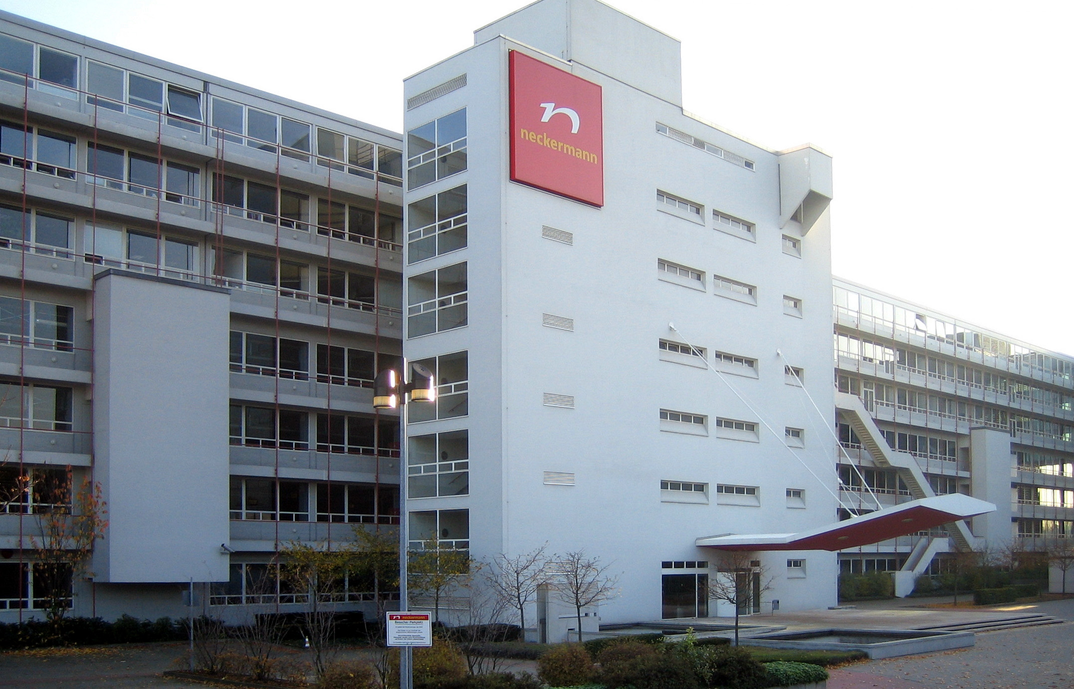 Haupteingang der 1960 neu gebauten Neckermann-Zentrale in Frankfurt am Main. Auffällig die an der Fassade angebrachten Schächte und Treppen.